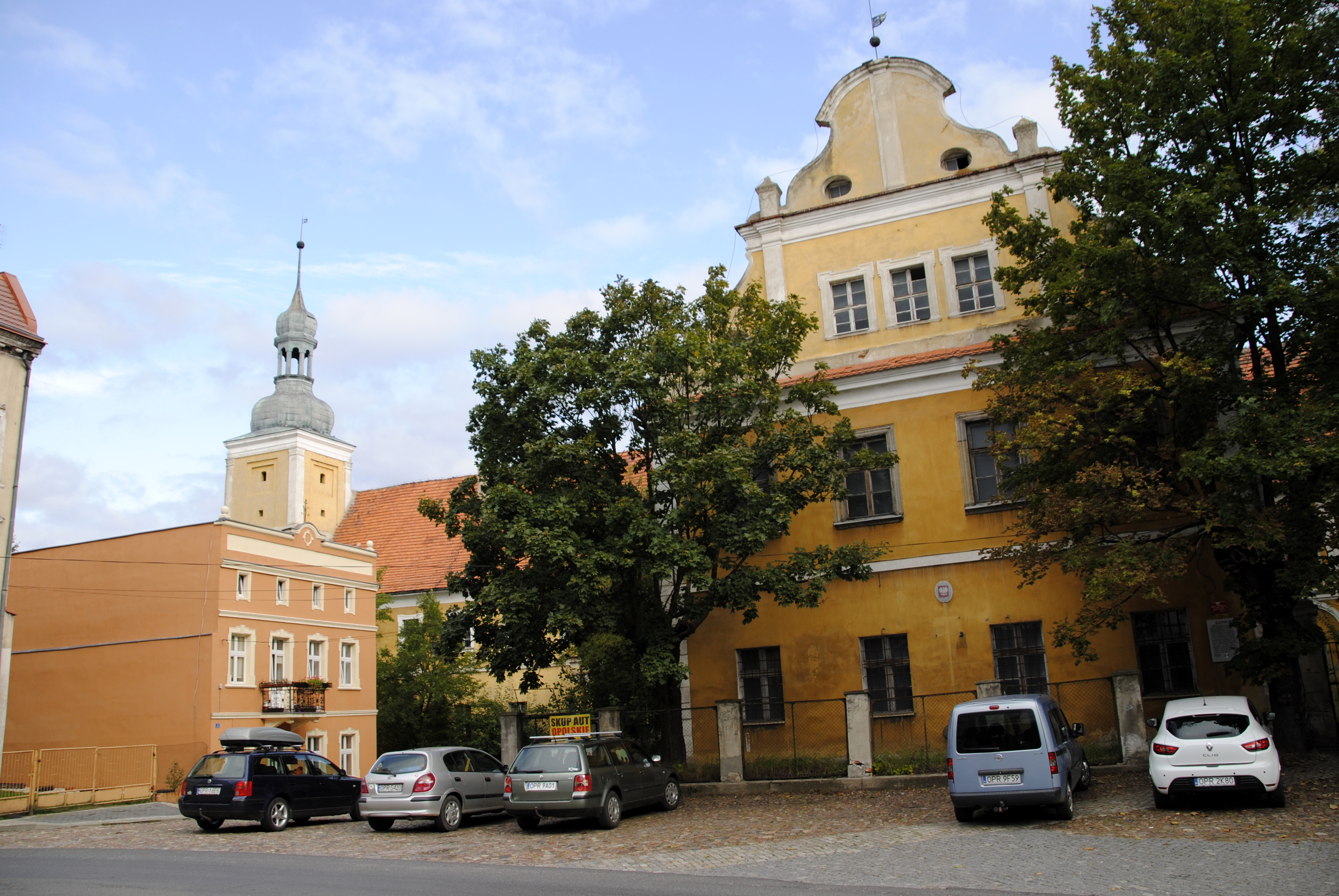 Schloss Zülz (Oberschlesien)